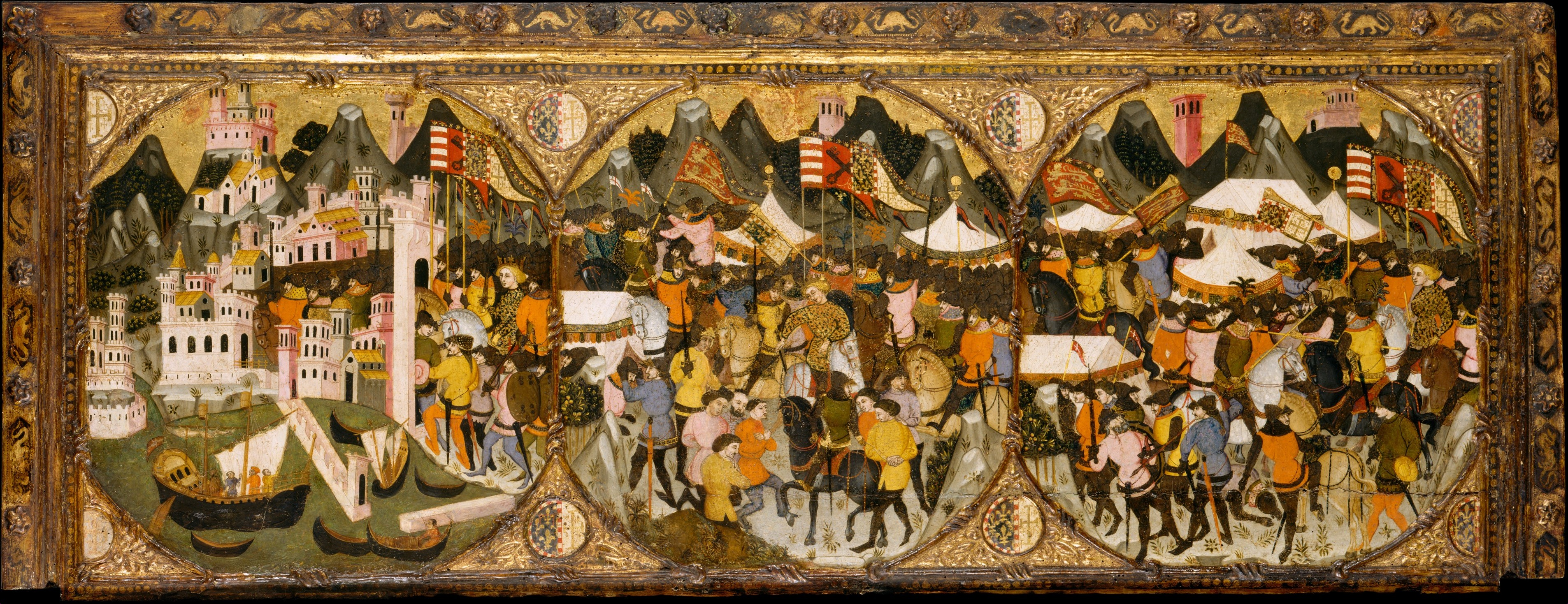 Painting, cassone panel; Paintings